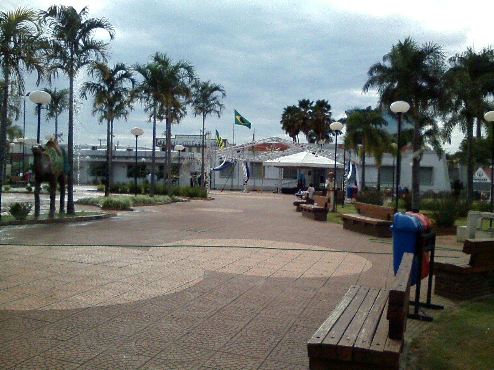 Visão ampla de uma parte da praça da prefeitura de Trindade.